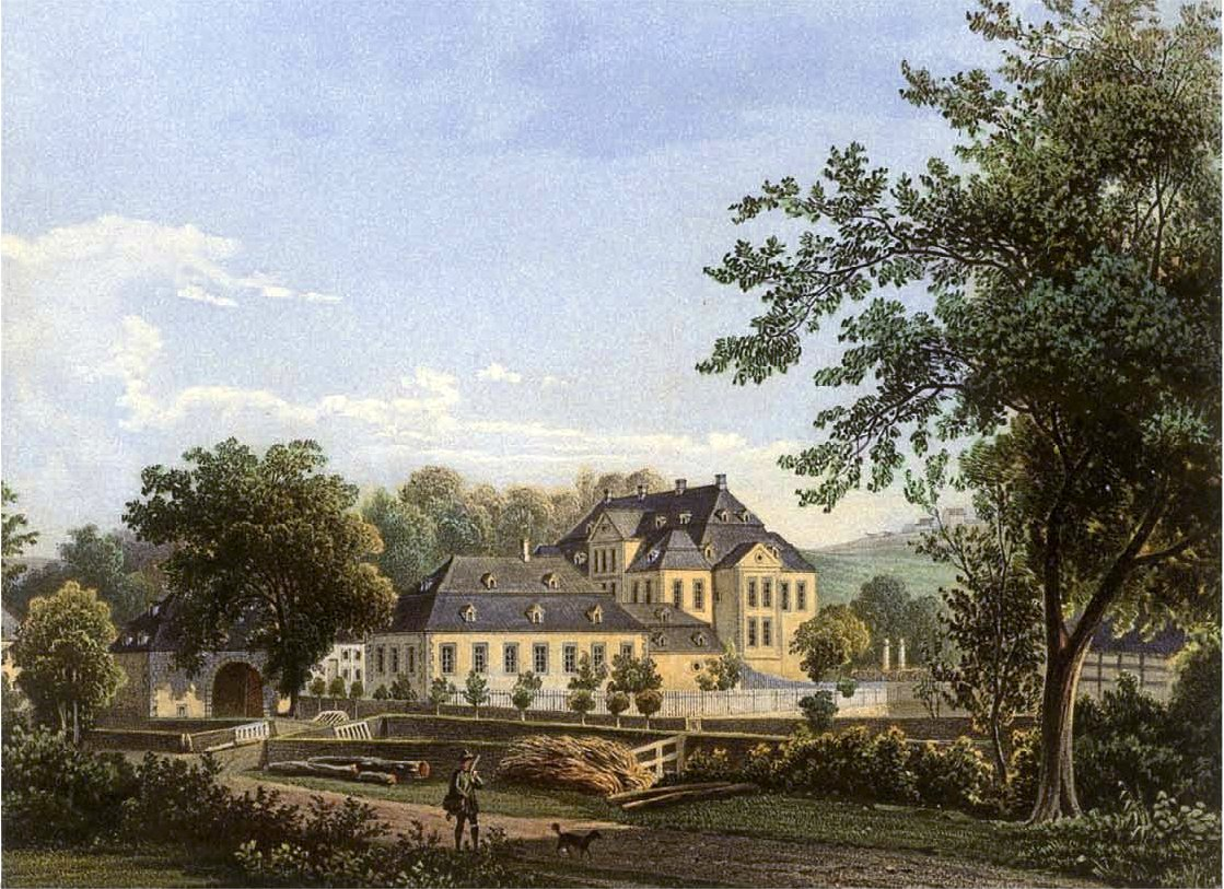 Schloss Körtlinghausen, Lithographie von Alexander Duncker, 1869